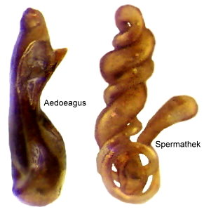 Familie: Staphylinidae Groesse: 0,66 mm Beschreibung: Aedoeagus, Spermathek Photo: U.Schmidt, 2009